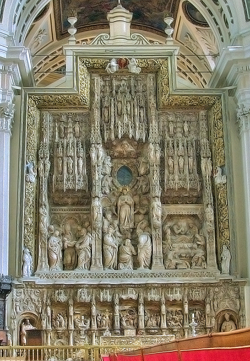 Retablo de la Asunción del altar mayor de la Basílica de Nuestra Señora del Pilar de Zaragoza (España)